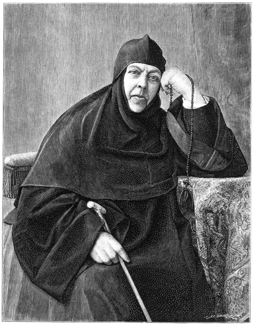 Портрет игуменьи Митрофании (урождённой баронессы Розен).